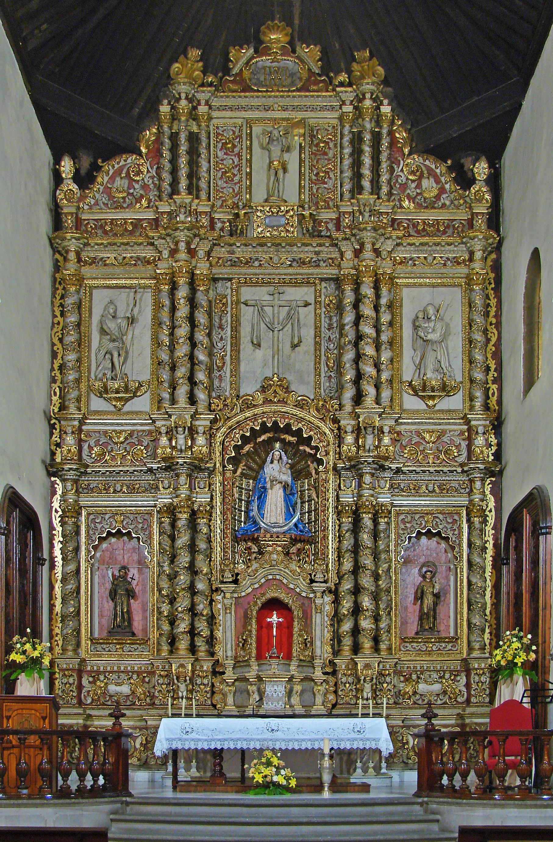 Puerto de la Cruz, Hauptaltar der Kirche Nuestra Señora de la Peña de Francia